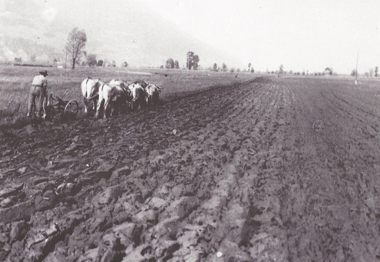 Piano di Magadino a vocazione agricola